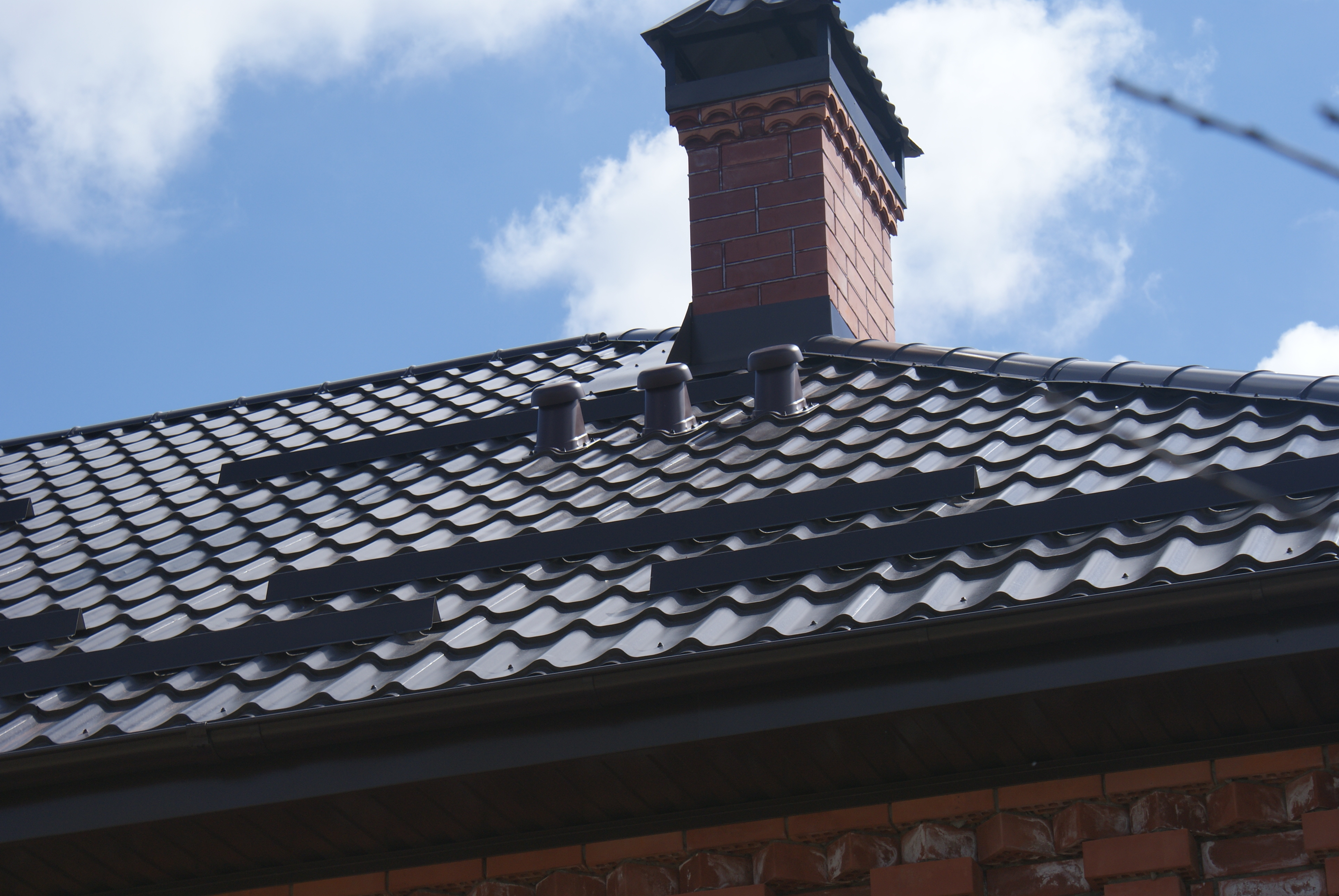 Три вентиляционный выхода на крыше из металлочерепице идентичного с ней цвета